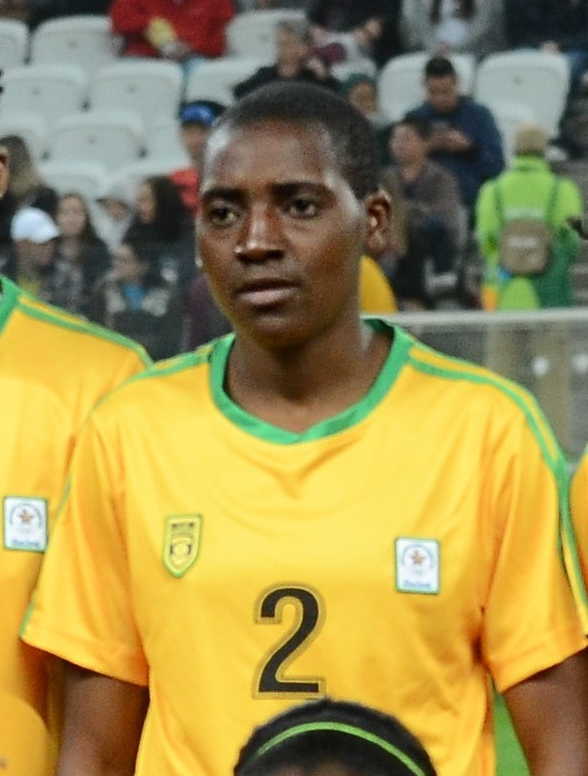 São Paulo - Seleções femininas do Zimbábue e da Alemanha se enfrentam na Arena Corinthians (Rovena Rosa/Agência Brasil)